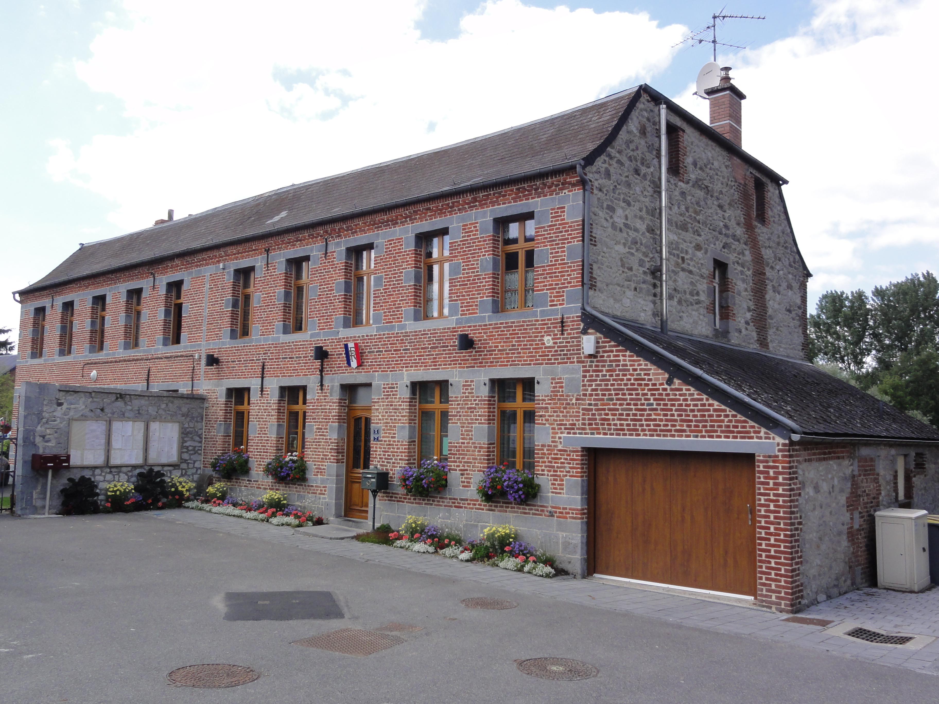 Saint-Remy-Chaussée (Nord, Fr) mairie